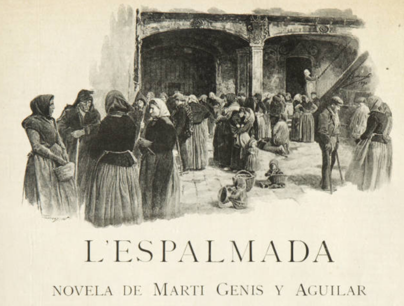 La Ilustració Catalana, número 235 31 Abril de 1890 pàg. 125